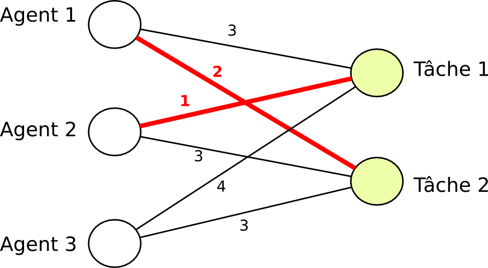 Mise en correspondance entre un groupe d'agent et de tâche en respectant un cout total minimal.